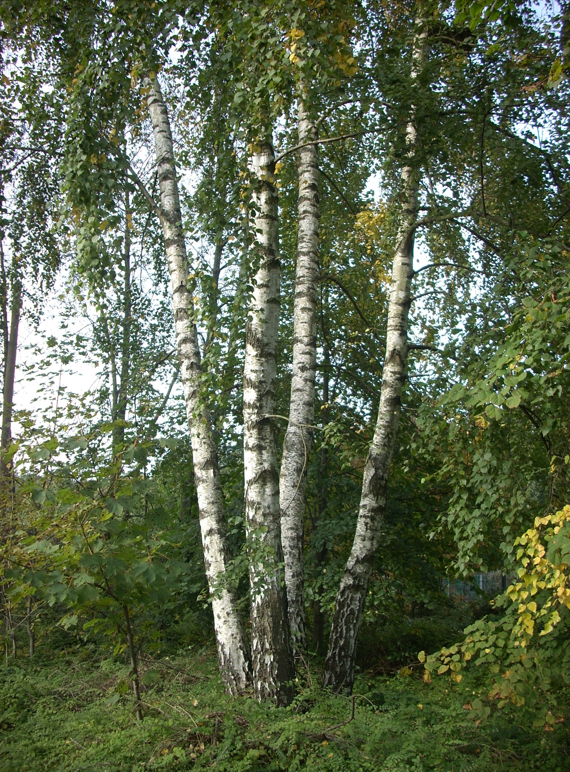 Betula pendula